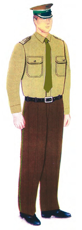 Ubiór służbowy SG funkcjonariuszy noszących umundurowanie WL z koszulą koloru khaki, krawatem, spodniami i czapką garnizonową.